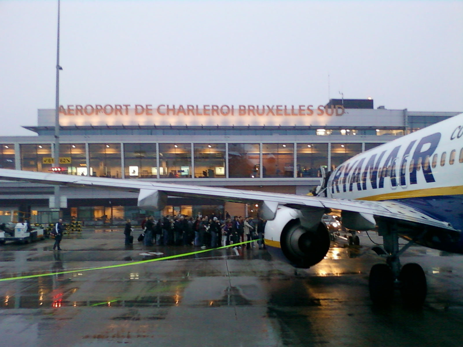 Vue de l'aéroport de Charleroi Brucelles-Sud avant embarquement dans un avion de la compagnie Ryanair